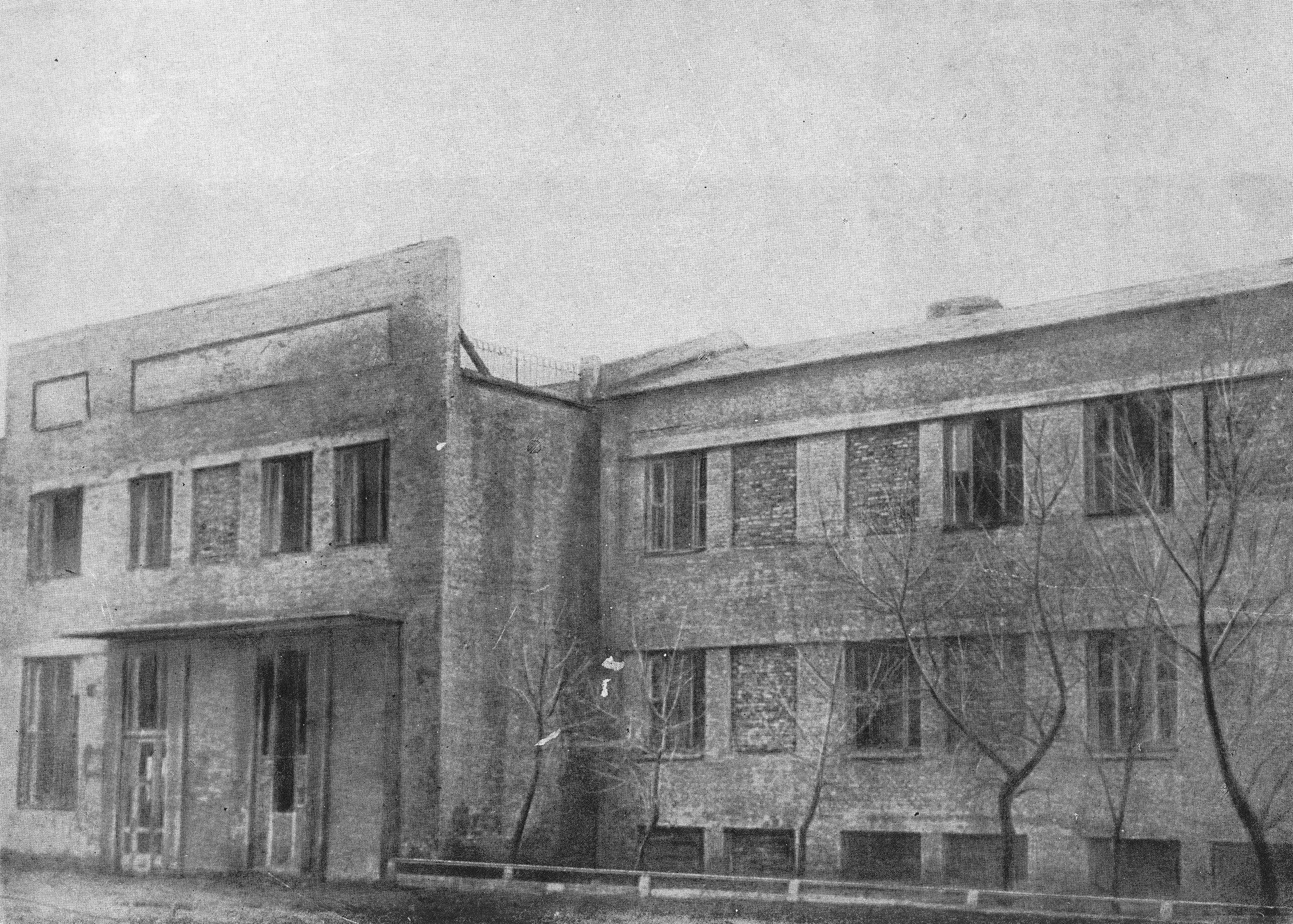 Разрушенное во время войны здание главного административного корпуса МакНИИ